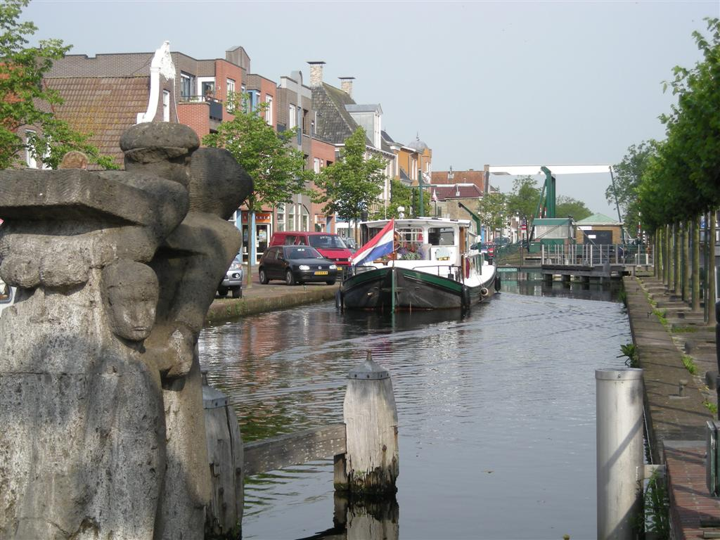 Gorredijk, brug, sluis, schip